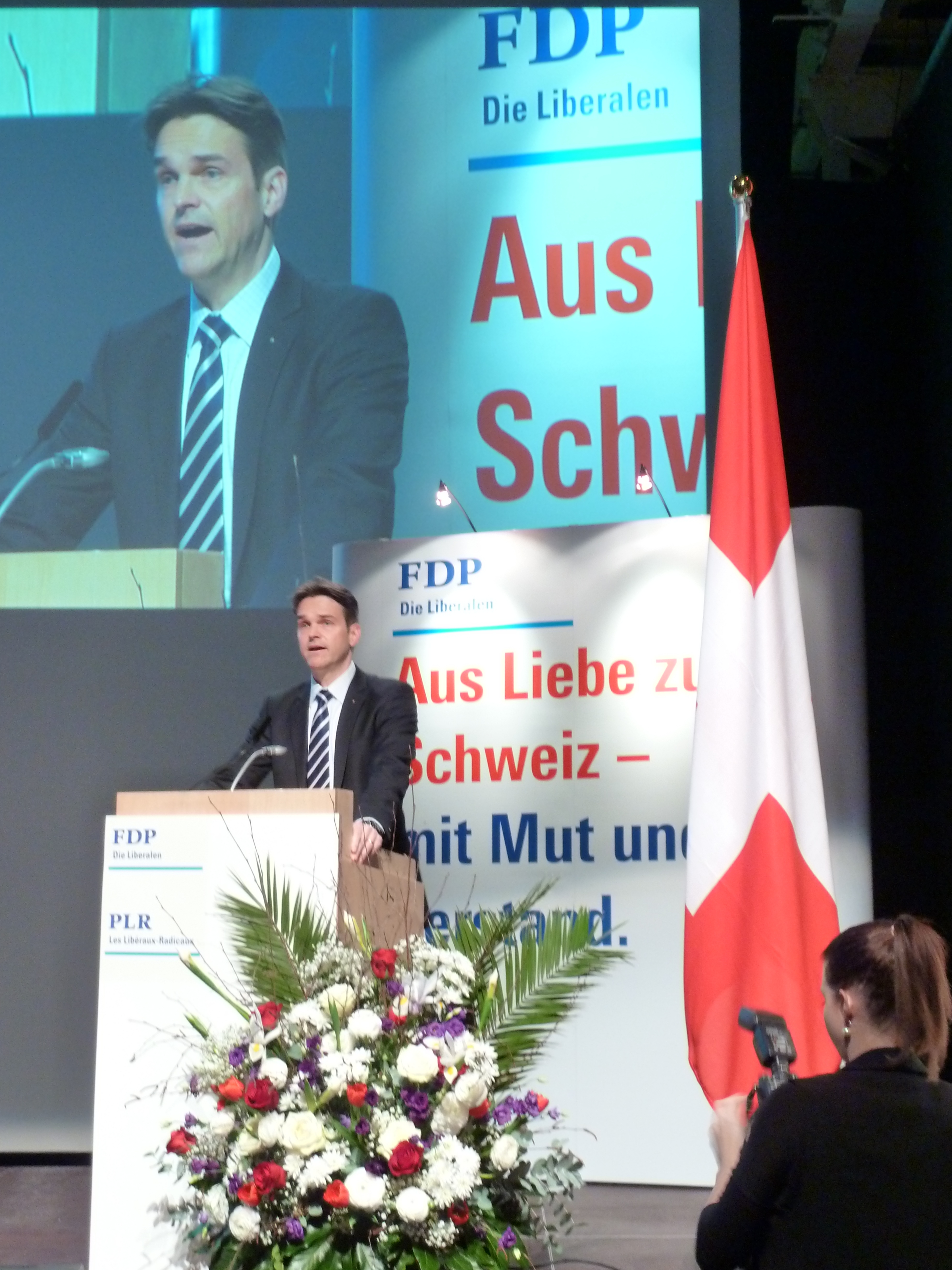 Beat Walti, Präsident der FDP.Die Liberalen des Kantons Zürich, eröffnet die Delegiertenversammlung der FDP Schweiz in Zürich.